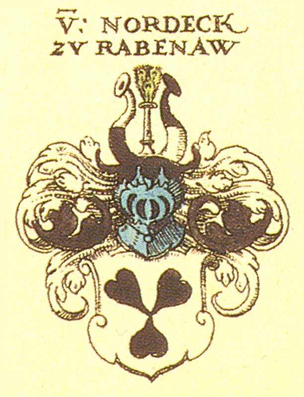 Wappen des pfälzisch-hessischen Adelsgeschlechts Nordeck zur Rabenau.